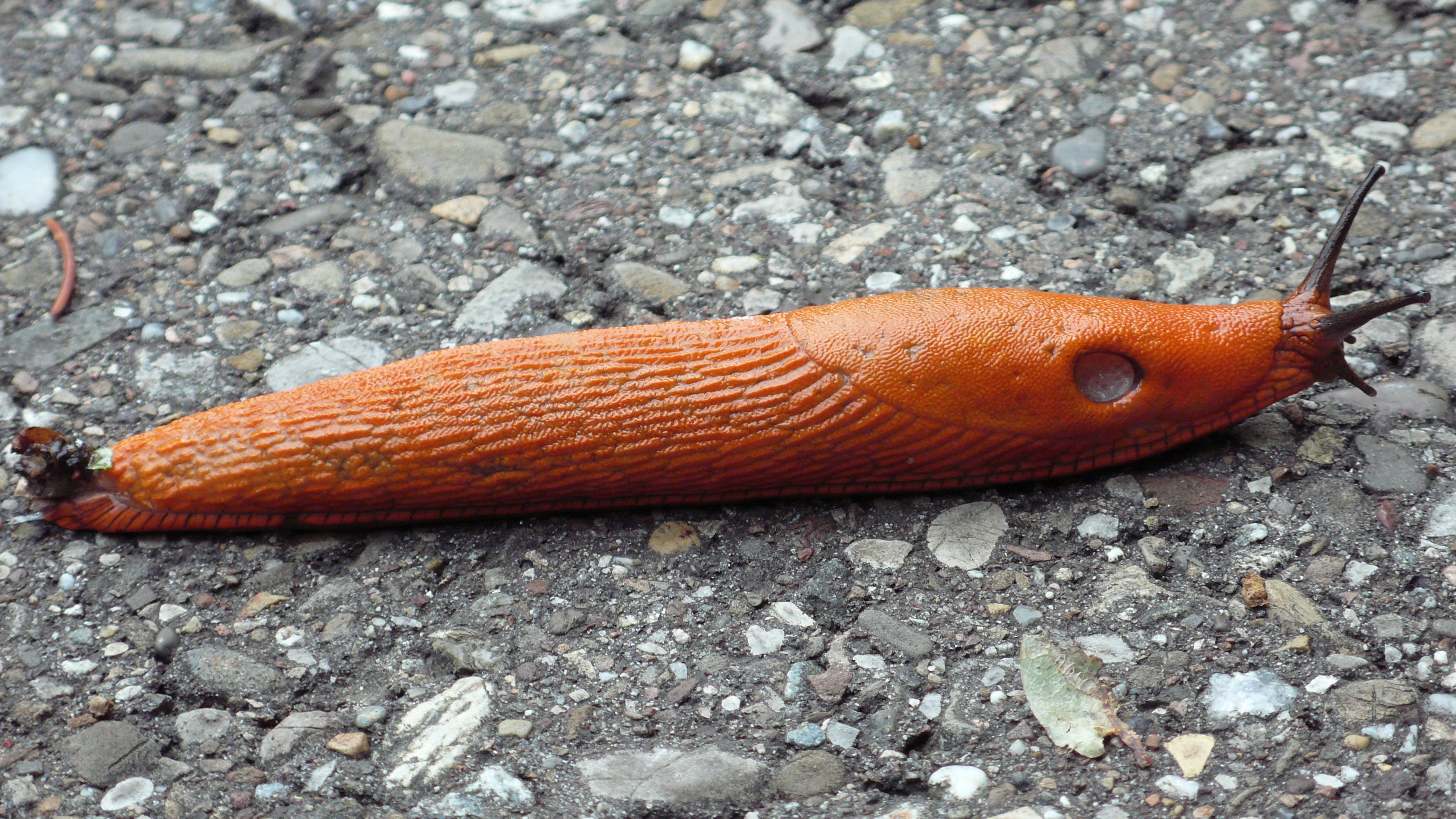 Rote Wegschnecke (Arion rufus)